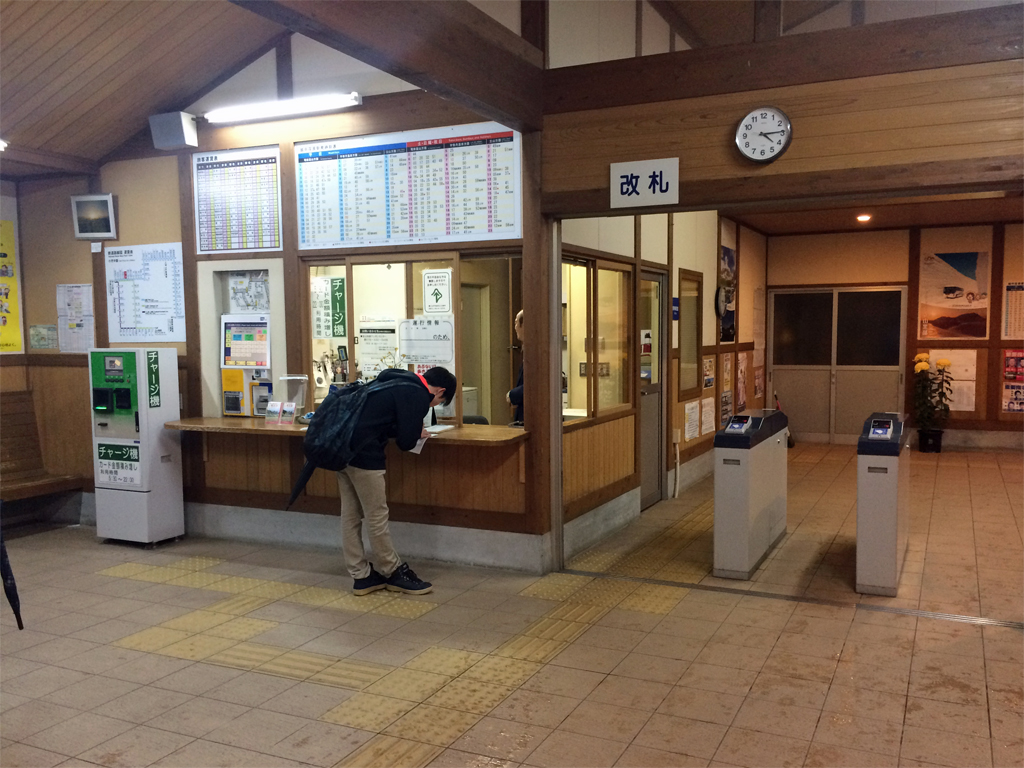 富山地方鉄道本線越中荏原駅 駅舎内